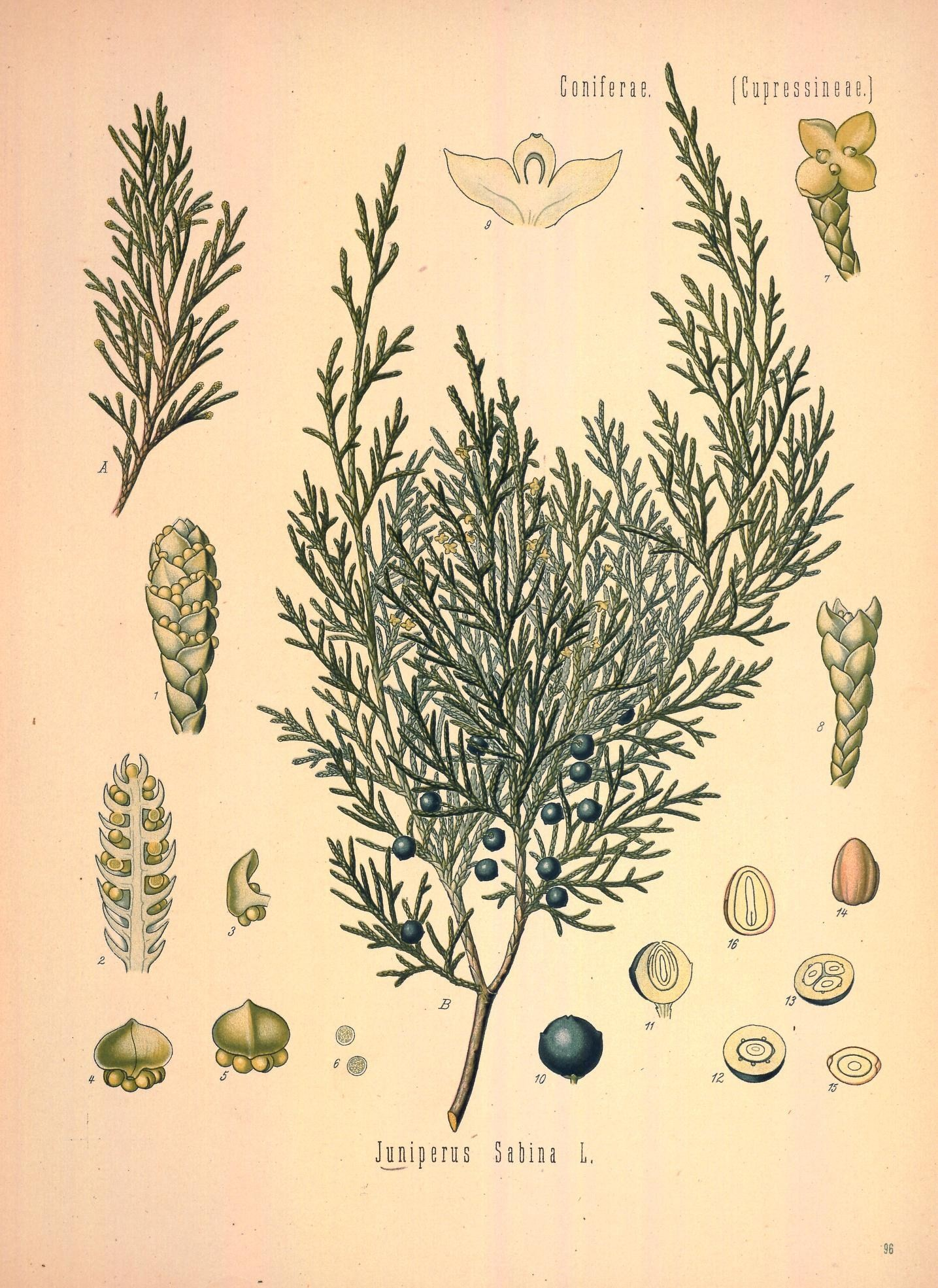 Sadebaum. A männlicher Blüthenzweig, natürl. Grösse; B Fruchtzweig, desgl.; 1 männliche Blüthe, vergrössert; 2 dieselbe im Längsschnitt, desgl.; 3, 4, 5 Staubgefässe von verschiedenen Seiten, desgl.; 6 Pollen, desgl.; 7, 8 weibliche Blüthe, desgl.; 9 dieselbe im Längsschnitt, mit 2 Fruchtschuppen, desgl.; 10 reife Beere, desgl.; 11 dieselbe im Längsschnitt, desgl.; 12, 13 dieselbe im Querschnitt, 1- und 3 sämig, desgl.; 14 Same, desgl.; 15, 16 derselbe im Quer- und Längsschnitt, desgl.